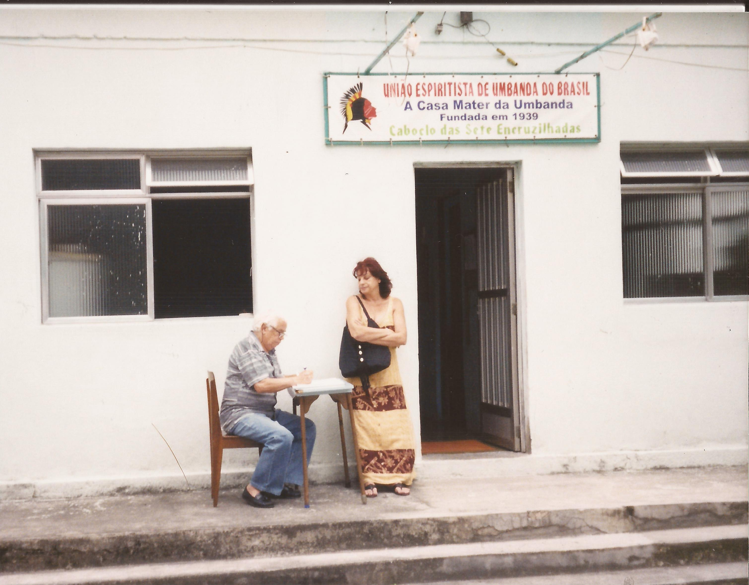 Vista da União Espiritista de Umbanda do Brasil, Casa Máter de Umbanda, no Rio de Janeiro, Brasil.